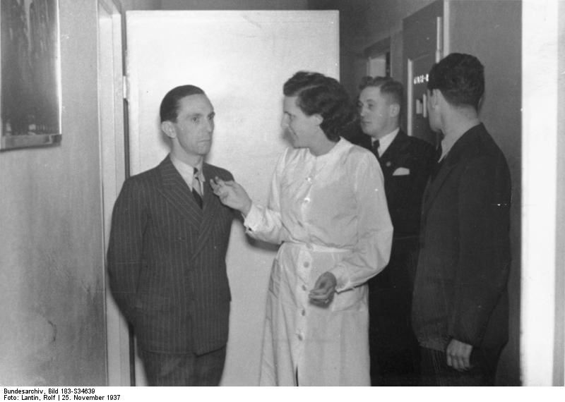 Joseph Goebbels und Leni Riefenstahl Reichsminister Dr. Goebbels besichtigt die umfangreichen Vorarbeiten für den Olympia-Film, der bekanntlich von Leni Riefenstahl hergestellt wird. Die Uraufführung des großen Filmwerkes, das aus zwei Teilen besteht, soll Ende Januar in Berlin stattfinden. Abgebildete Personen: Goebbels, Joseph: Reichsminister für Volksaufklärung und Propaganda, Gauleiter Berlin, Deutschland Riefenstahl, Leni: Filmproduzentin, Regisseurin, Schauspielerin, Fliegerin, Bundesrepublik Deutschland (PND 118600761)